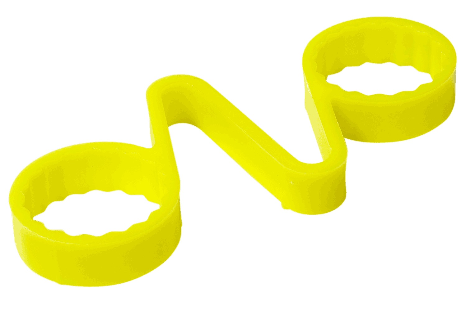 Der Checklink verbindet zwei Radmuttern miteinander, d.h. eine lose Radmutter wird in ihrer Bewegung eingeschränkt. Die Indikatorfunktion bezieht sich hierbei auf den Verbindungssteg, der sich verformt, wenn eine Mutter sich löst